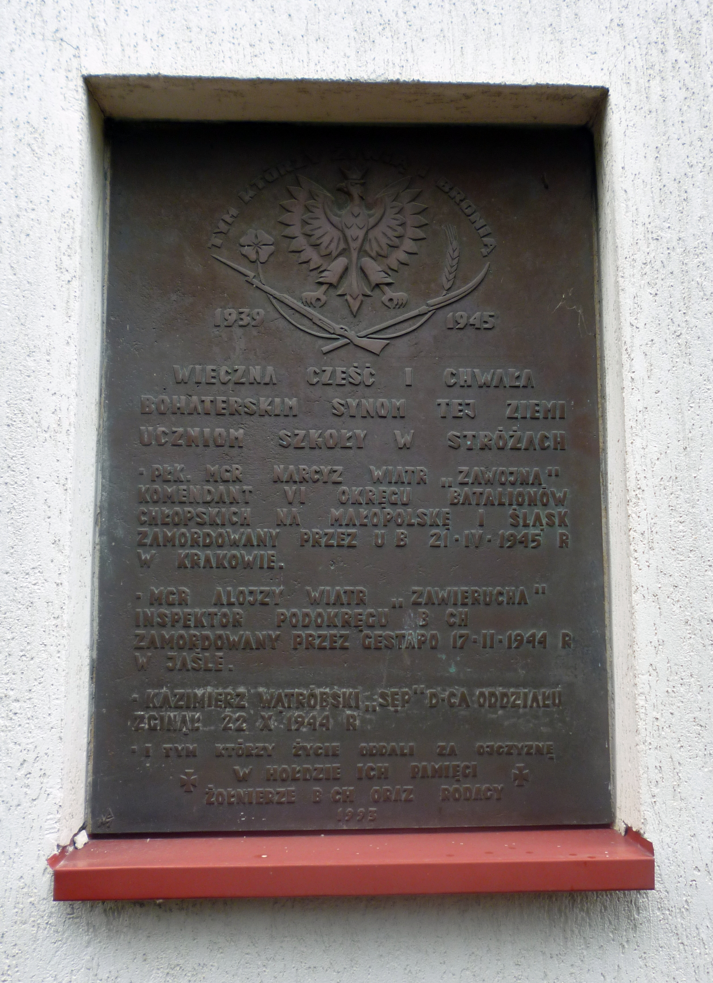 Tablica na budynku Szkoły Podstawowej w Stróżach upamiętniająca partyzantów BCh Narcyza Wiatra ps "Zawojna", Alojzego Wiatra ps"Zawierucha" oraz Kazimierza Wątrubskiego ps"Sęp"